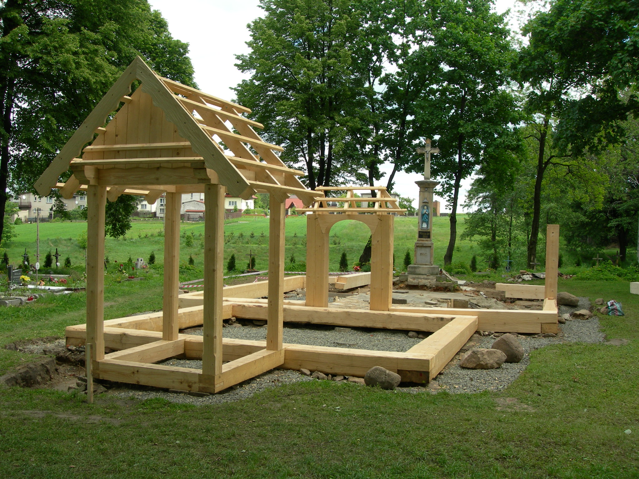 Leszczyny (woj. śląskie) aranżacja na miejscu przeniesionego do Palowic w 1981 roku kościółka Trójcy Przenajświętszej. 2006